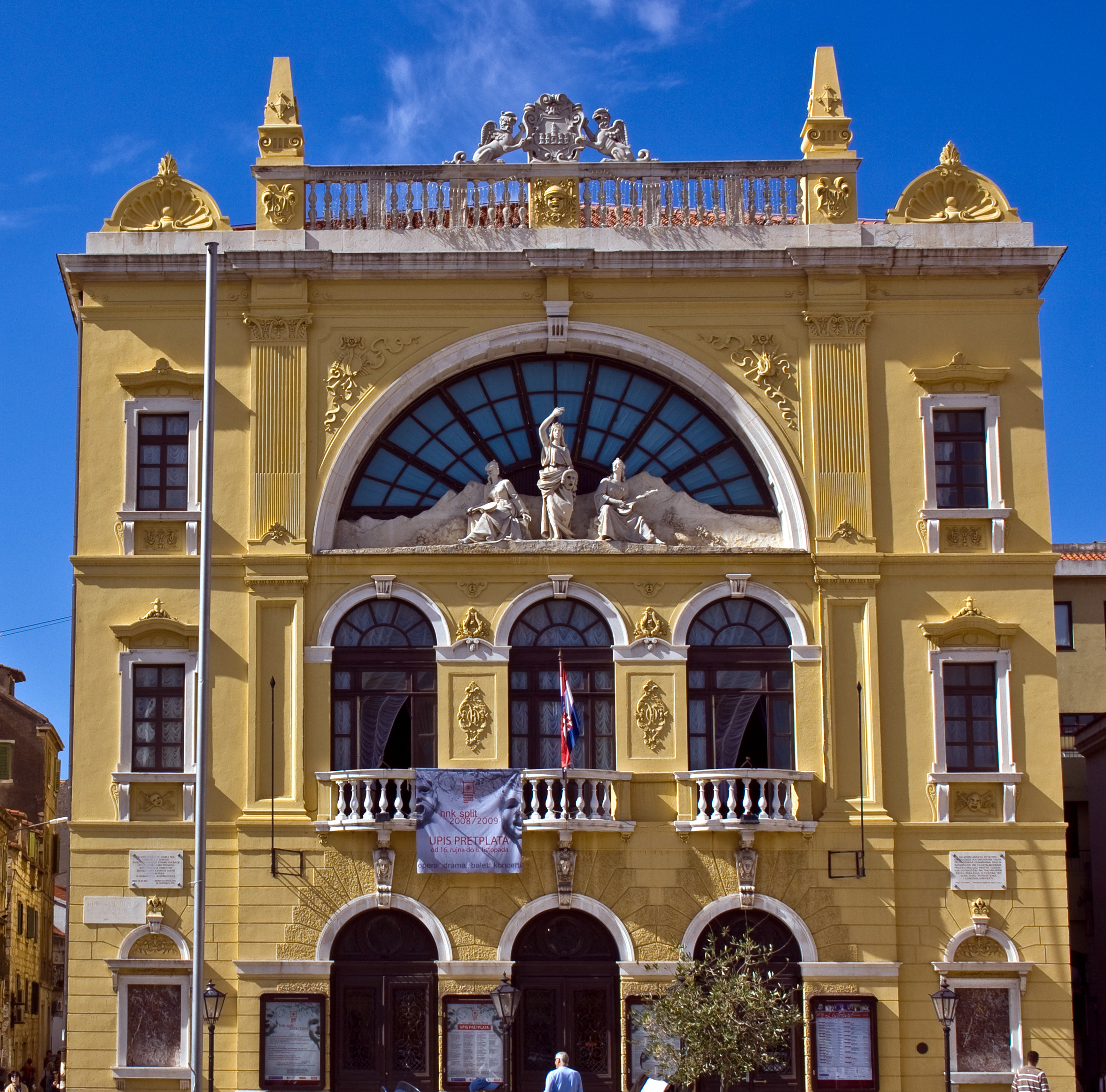 Split